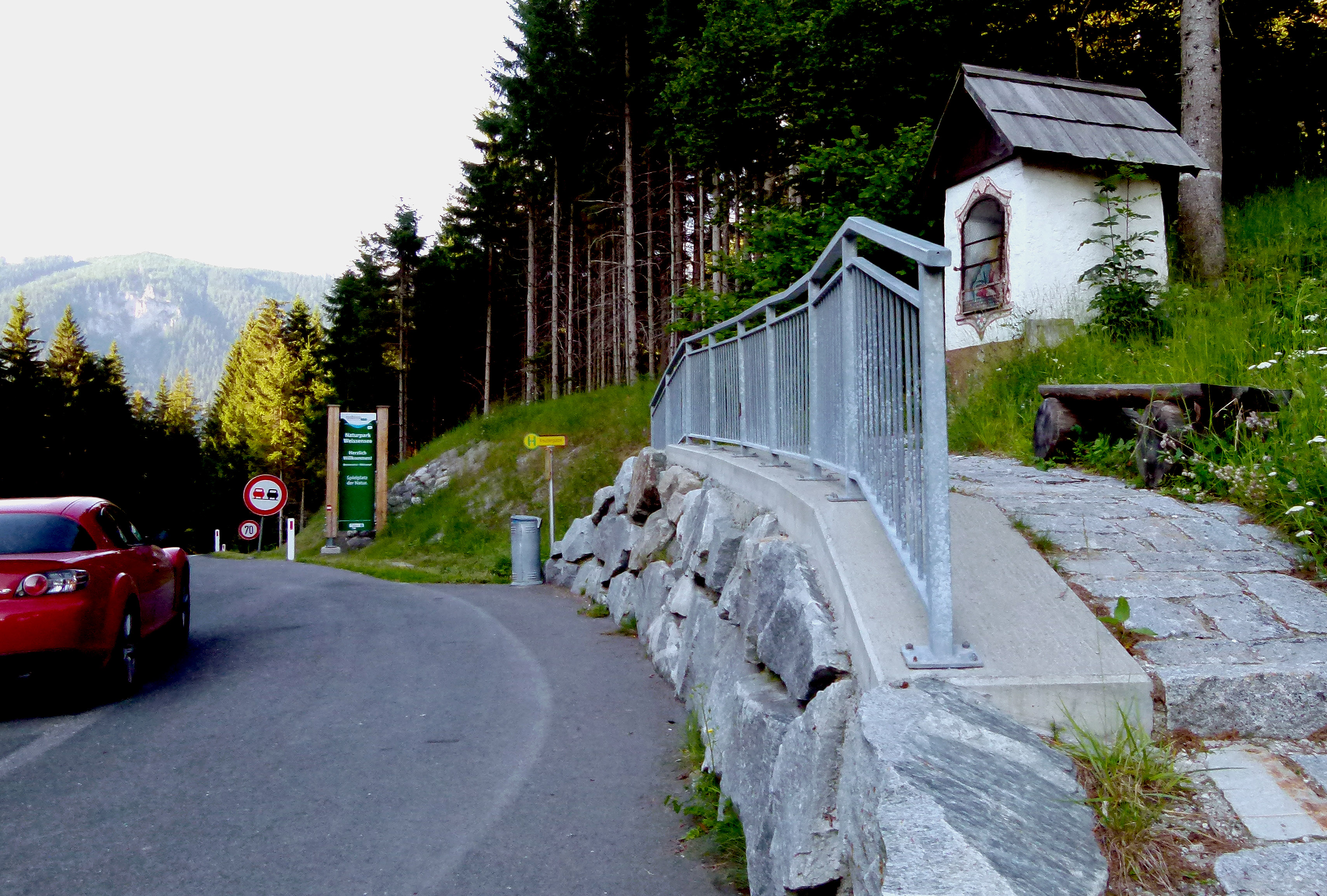 Kreuzberg-nyereg, emlékfülke a hágószinten